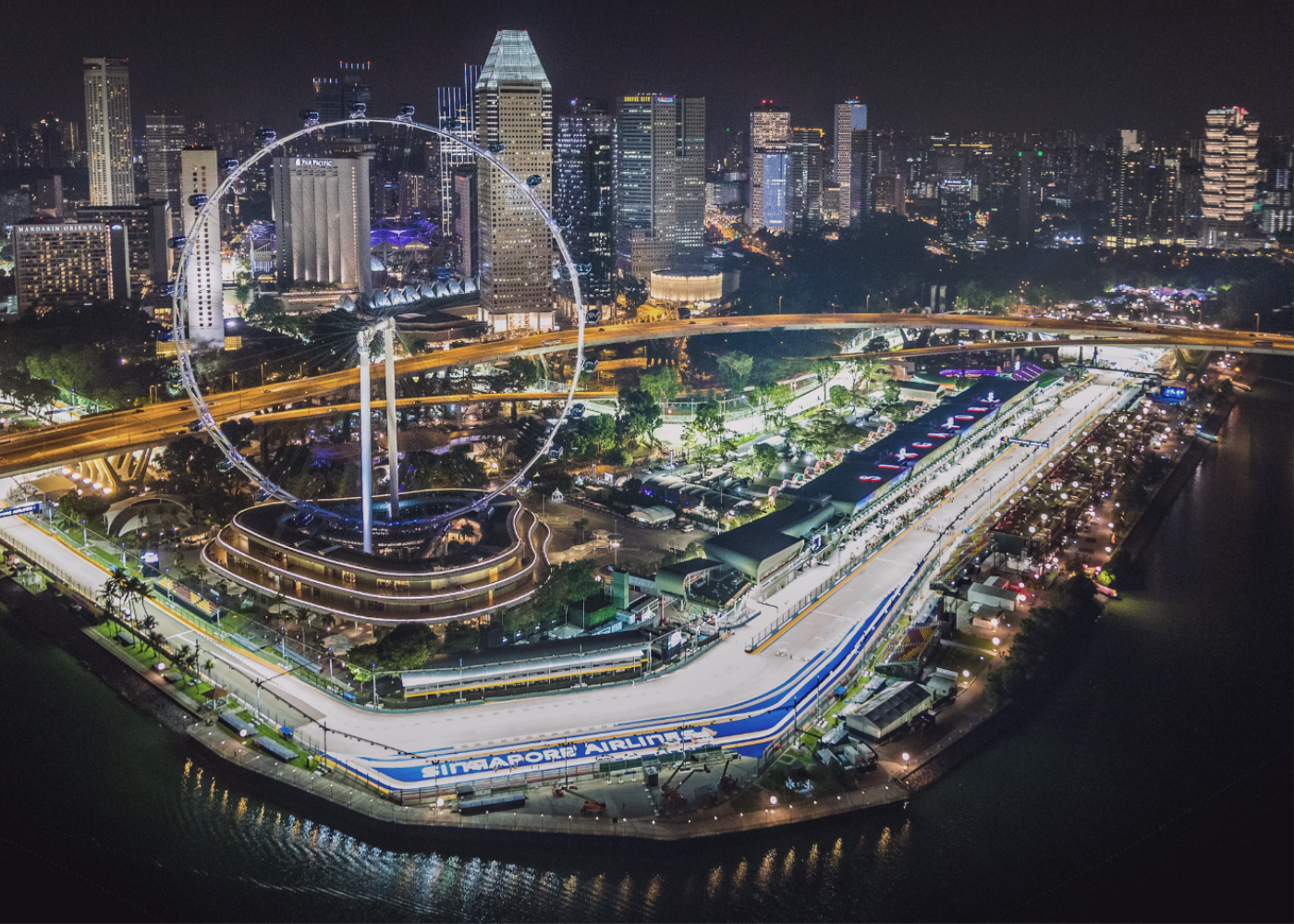 a